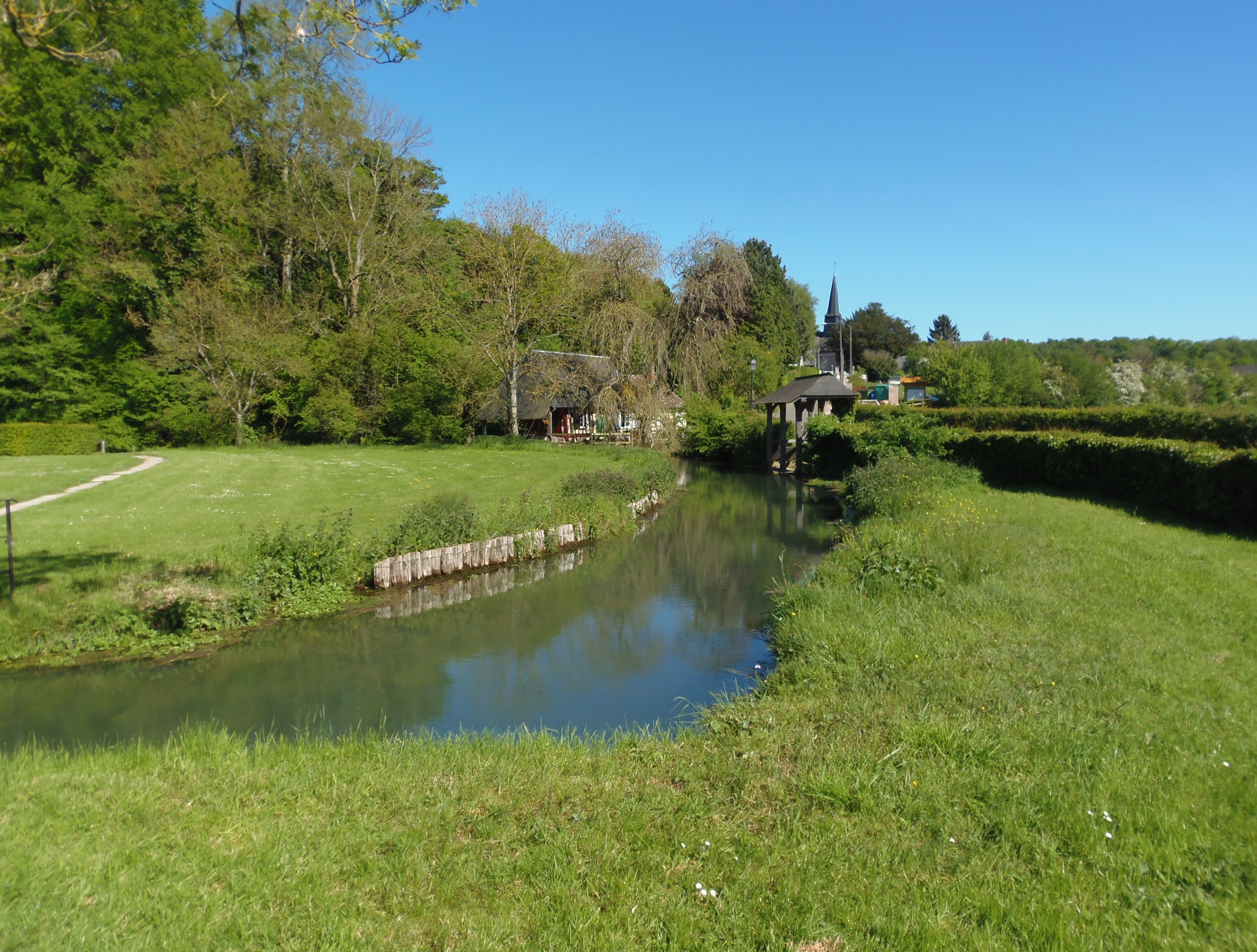 La Folletière-Abenon (Normandie, France). Le bourg et l'Orbiquet.